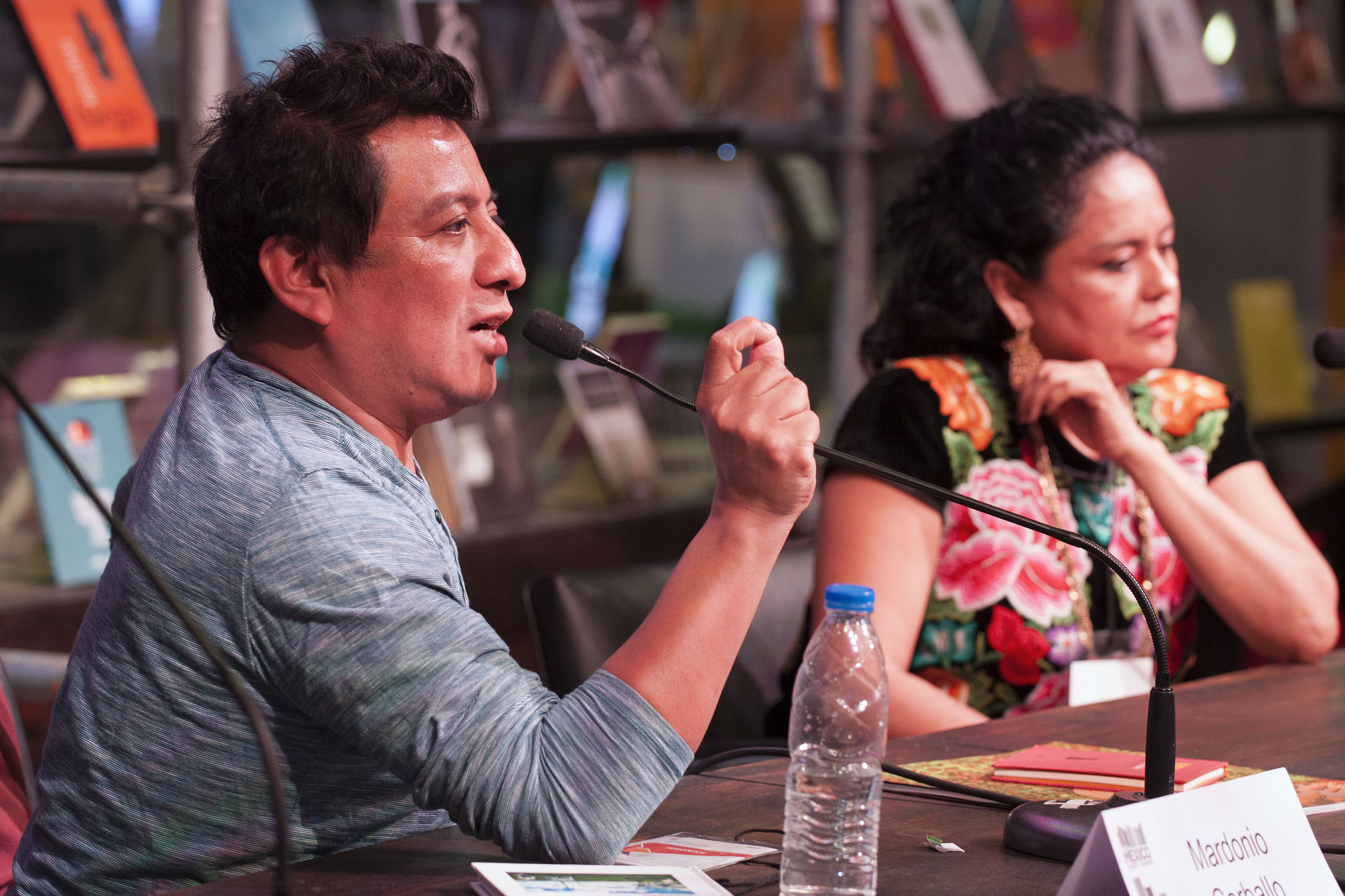 Viernes, 8 de Mayo 2015. En el marco de la 41a Feria Internacional del Libro de Buenos Aires se realizó la charla Poesía de Lenguas Ancestrales con Mardonio Carballo y Natalia Toledo en el Stand de la Ciudad de México. Foto: Antonio Nava / Secretaría de Cultura Ciudad de México.